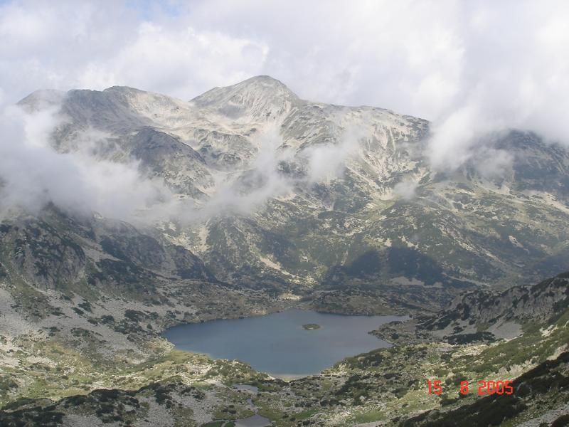 "Popovo ezero" - lake in Pirin mountain in Bulgaria